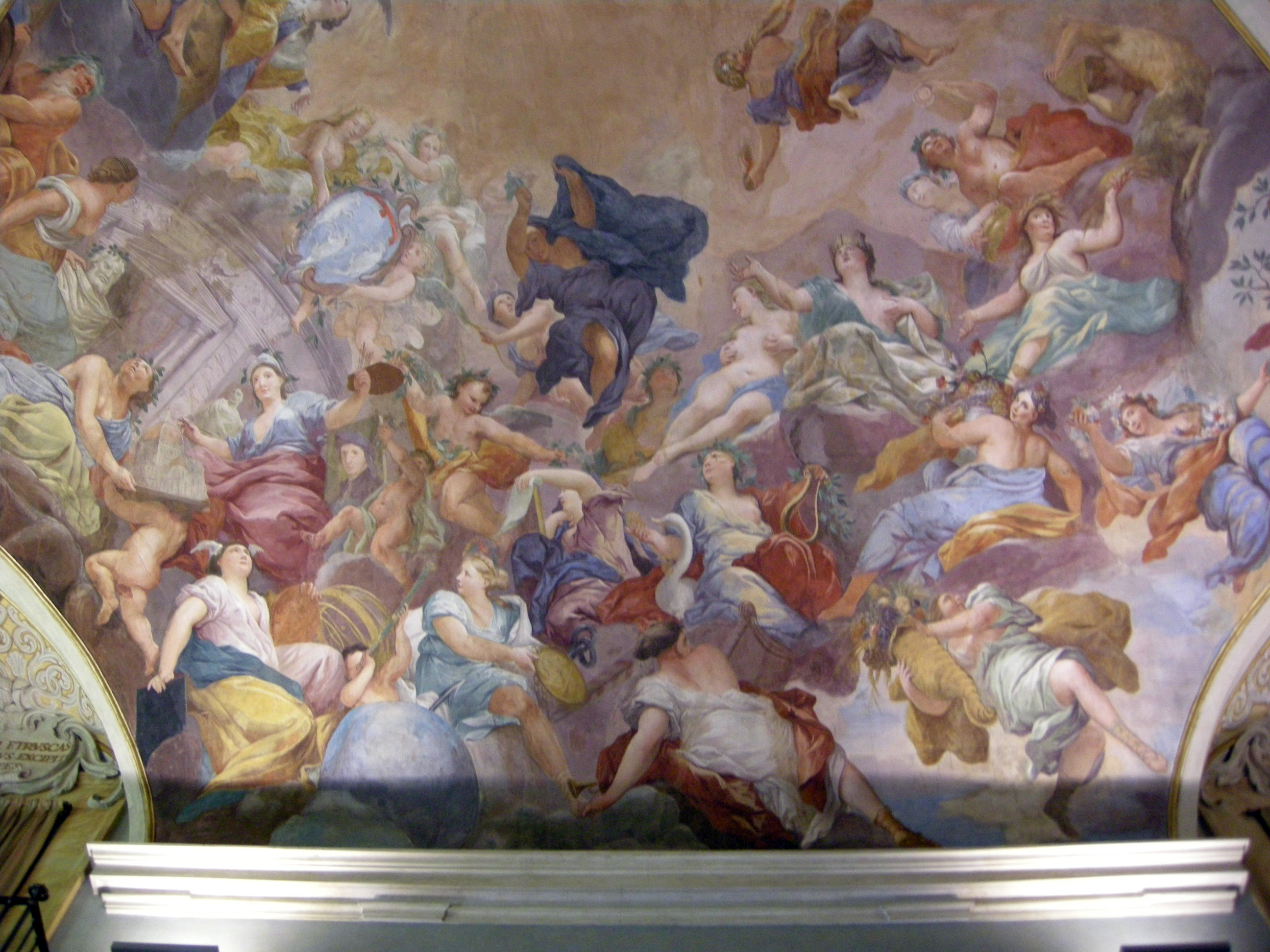 Palazzo orlandini, salone di a. gherardini